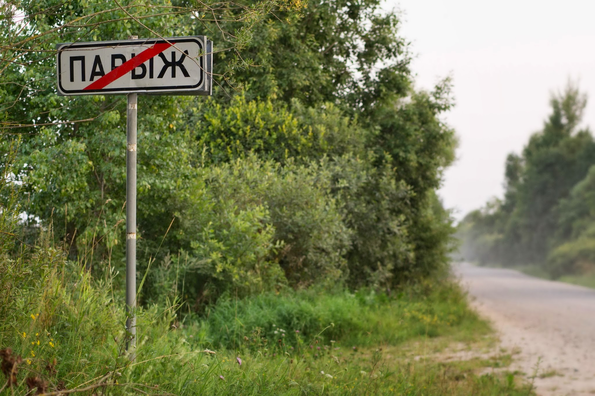 Парыж (Беларусь) на мяжы